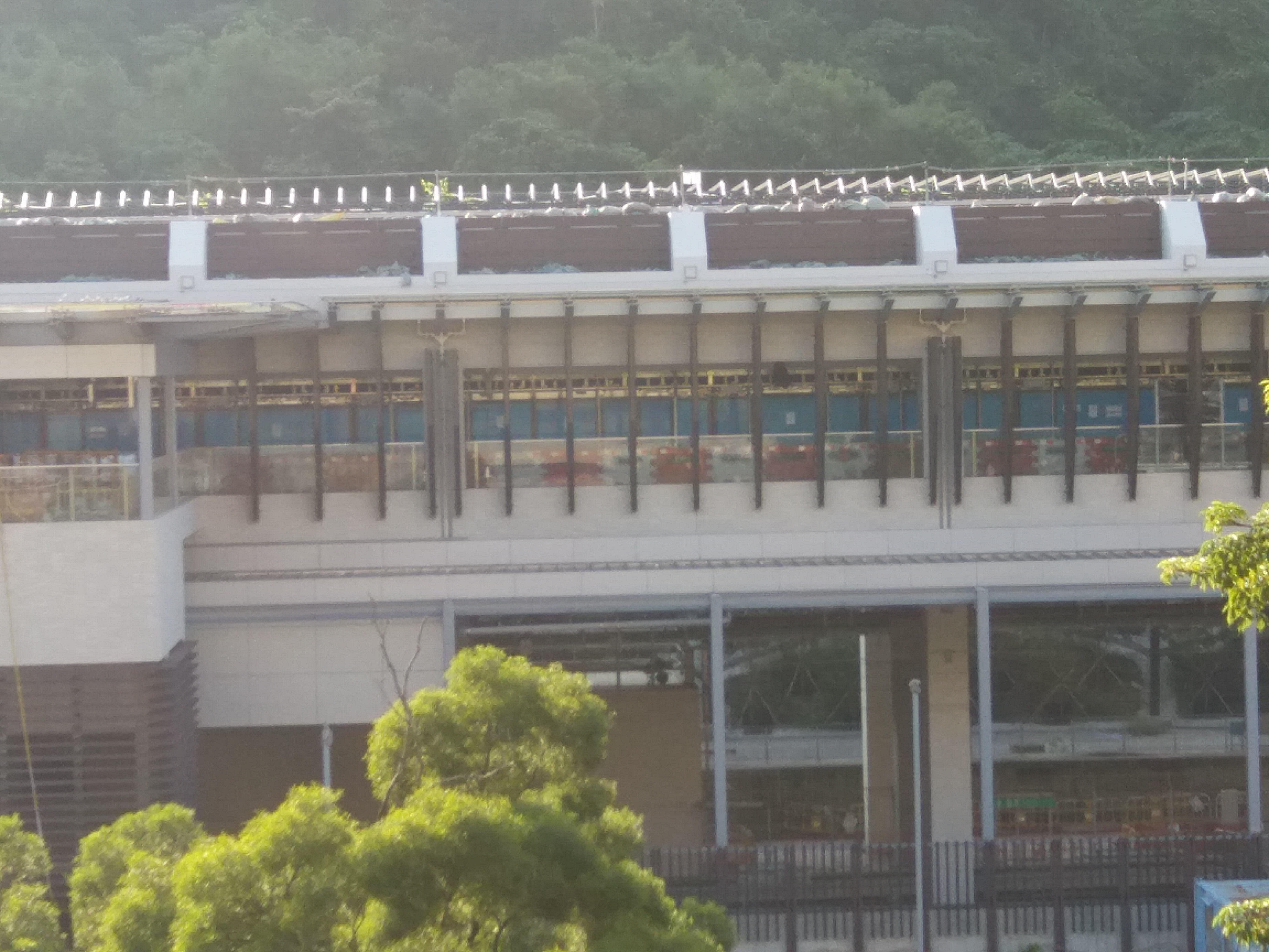 中文（香港）: 月台部分，可見安裝月台幕門並非閘門